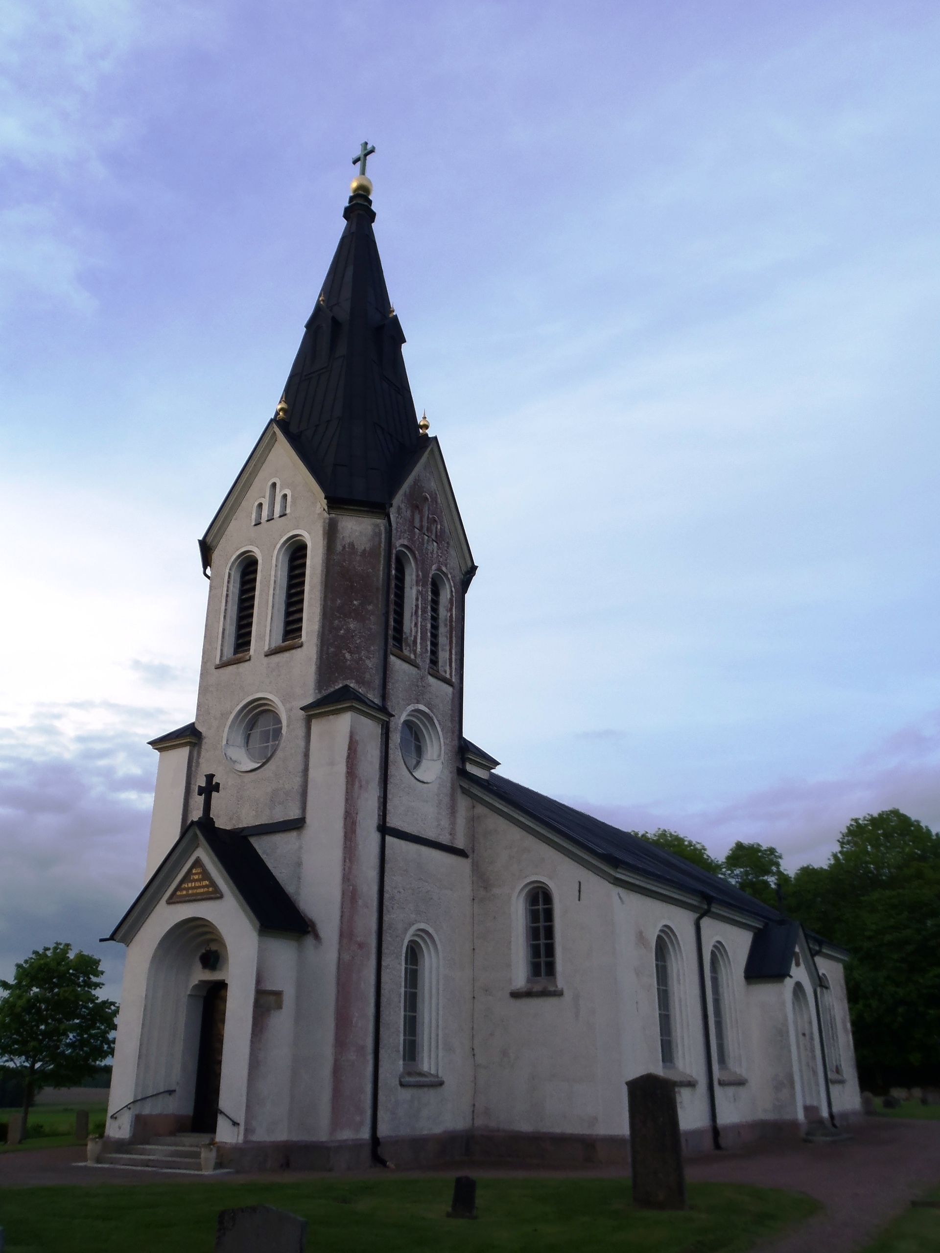 Skånings-Åsaka kyrka.